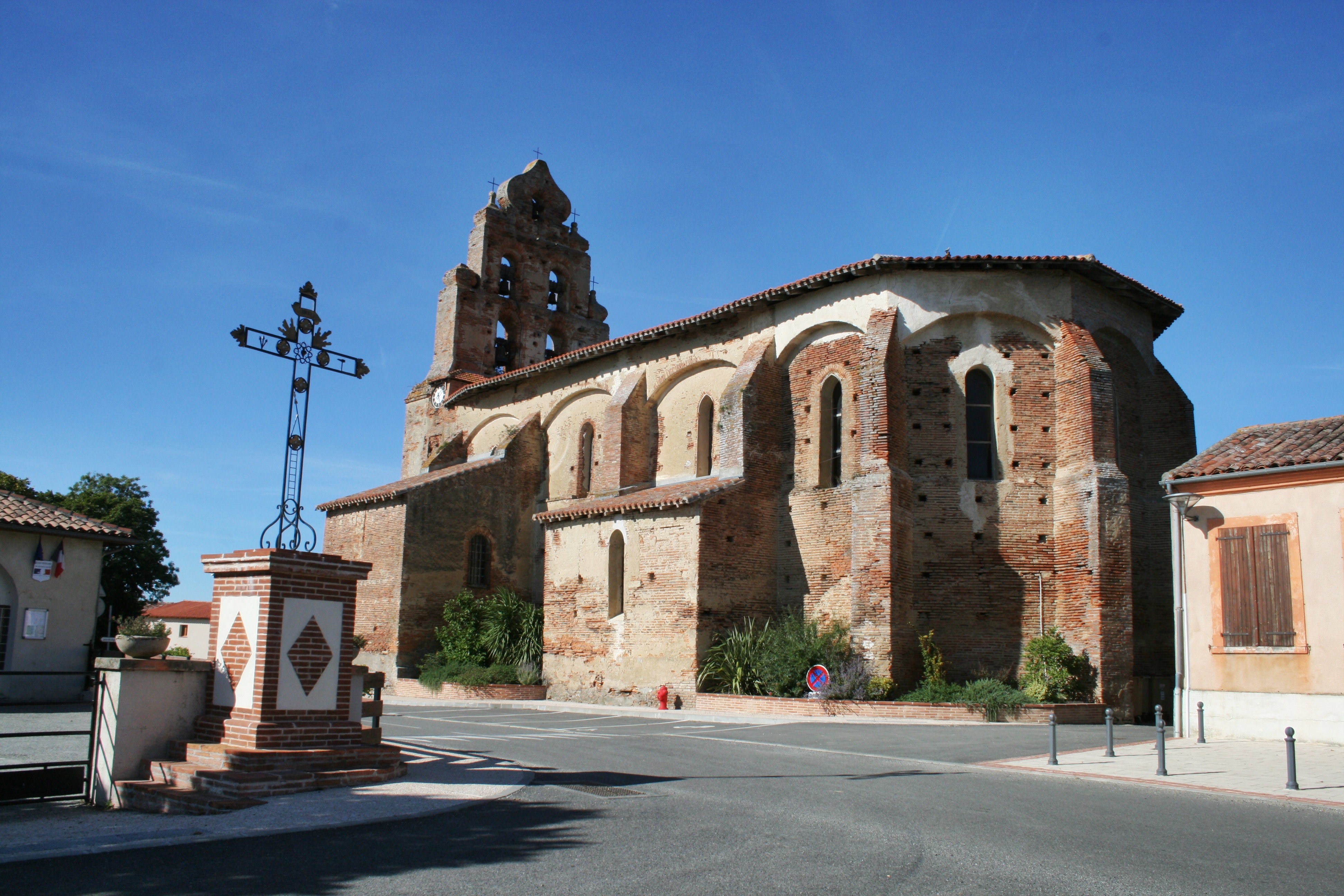 Église de la commune de Seysses-Savès, dans le Gers